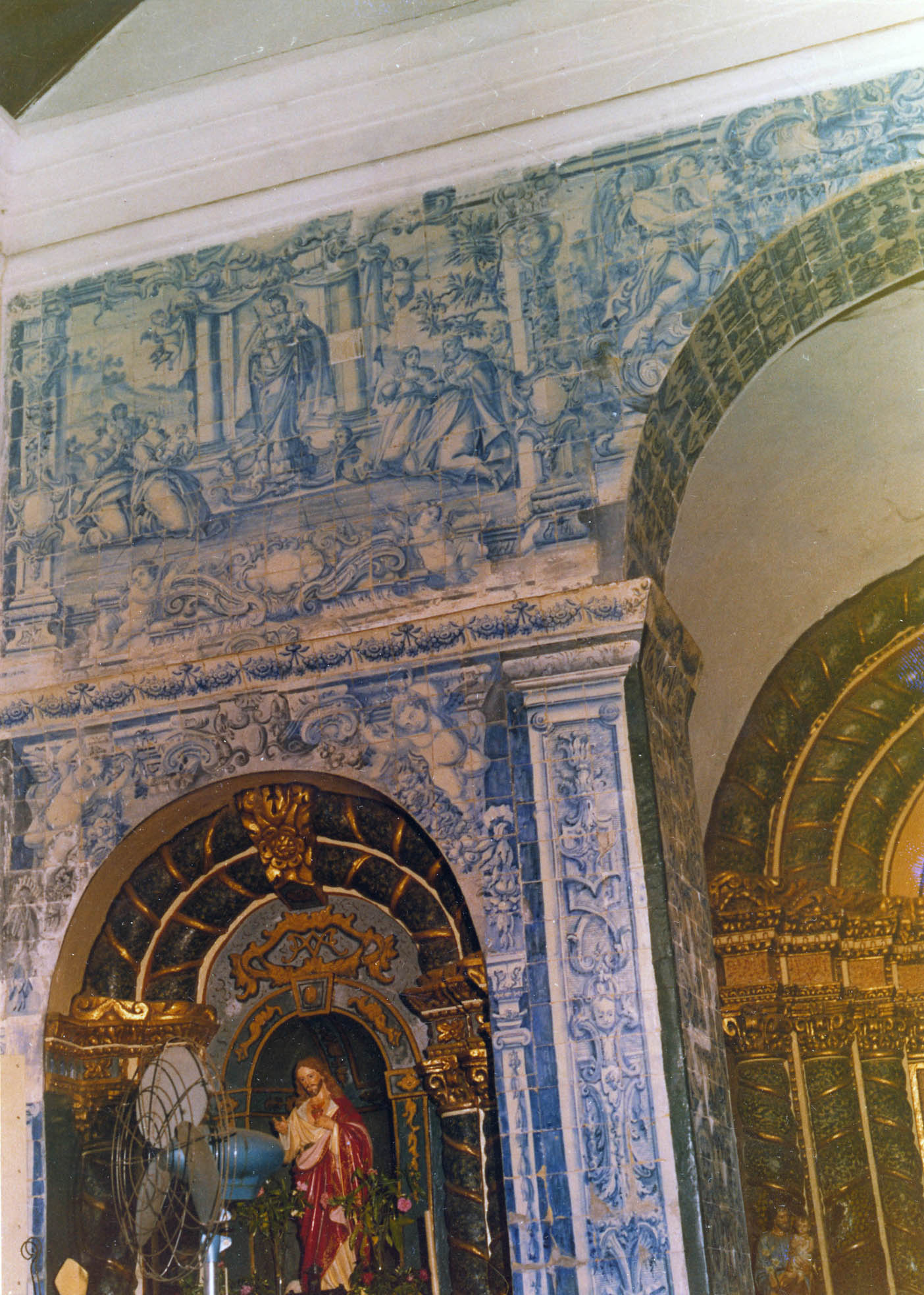 Painel ornamental e representação de milagres de Nossa Senhora. Fotógrafo: João Miguel dos Santos Simões (1907-1972). Data de produção da fotografia original: 1960-1970. [CFT009.3340.ic]